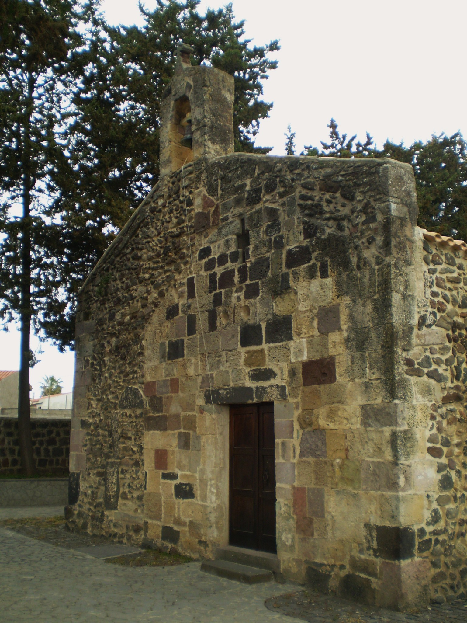 Zerfaliu (OR): la chiesa romanica di San Giovanni.